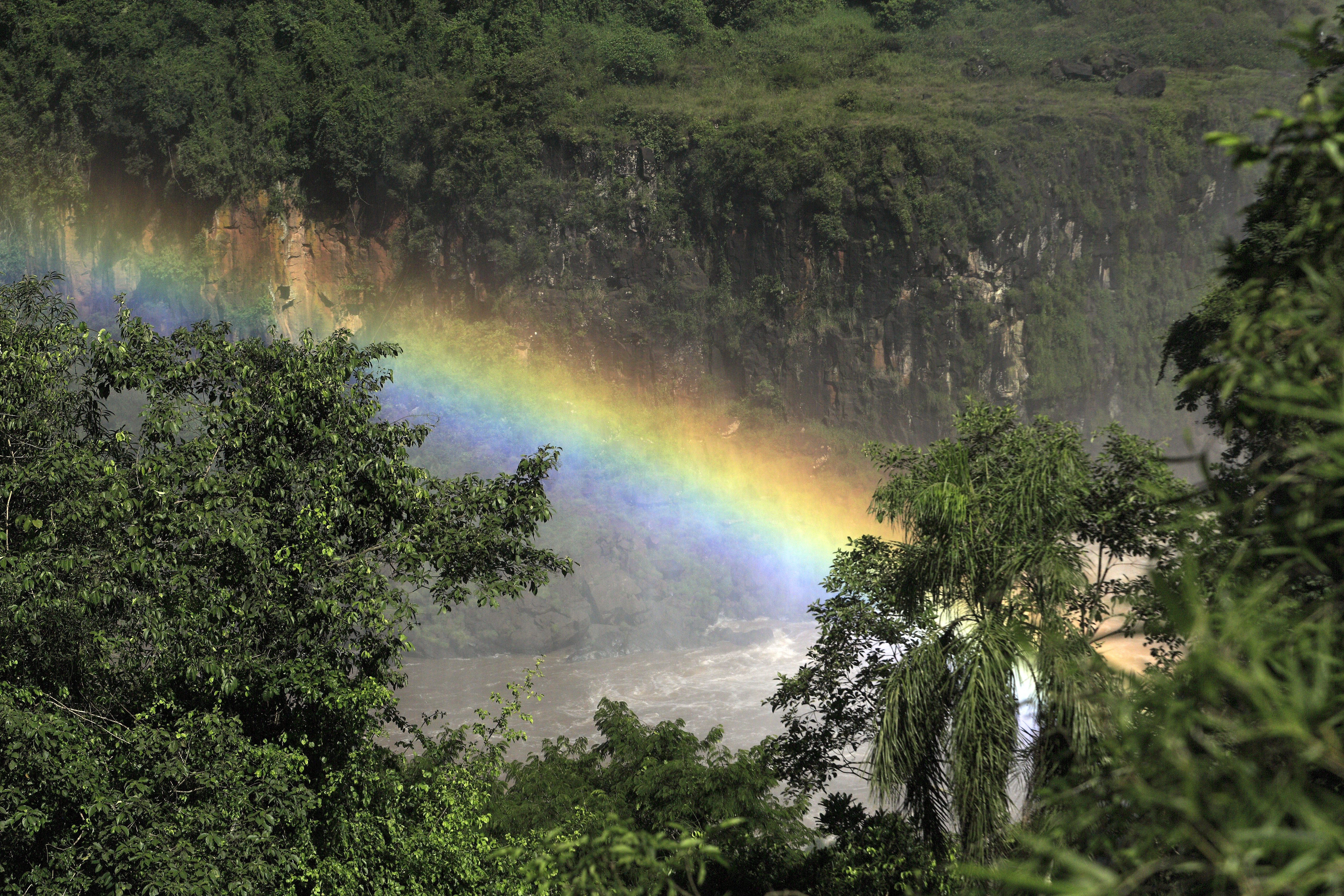 Oberhalb vom Salto Bossetti (vom Paseo Superior), Regenbögen entstehen hier an sonnigen Tagen nach dem Mittag zwangsläufig, wenn der Wasserstand hoch genug und damit genügend Sprühnebel vorhanden ist. Im Hintergrund liegt das brasilianische Ufer.